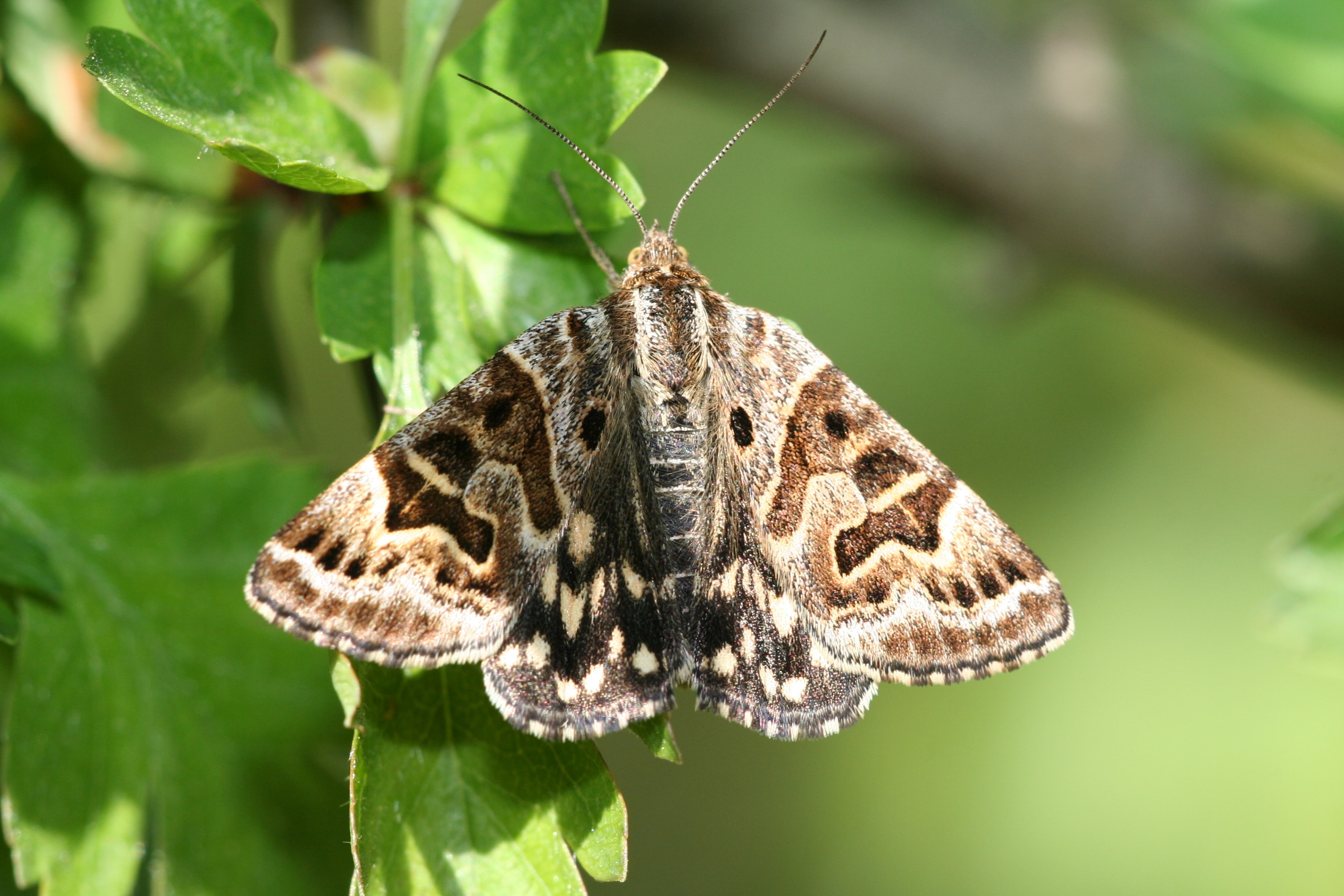 Callistege mi